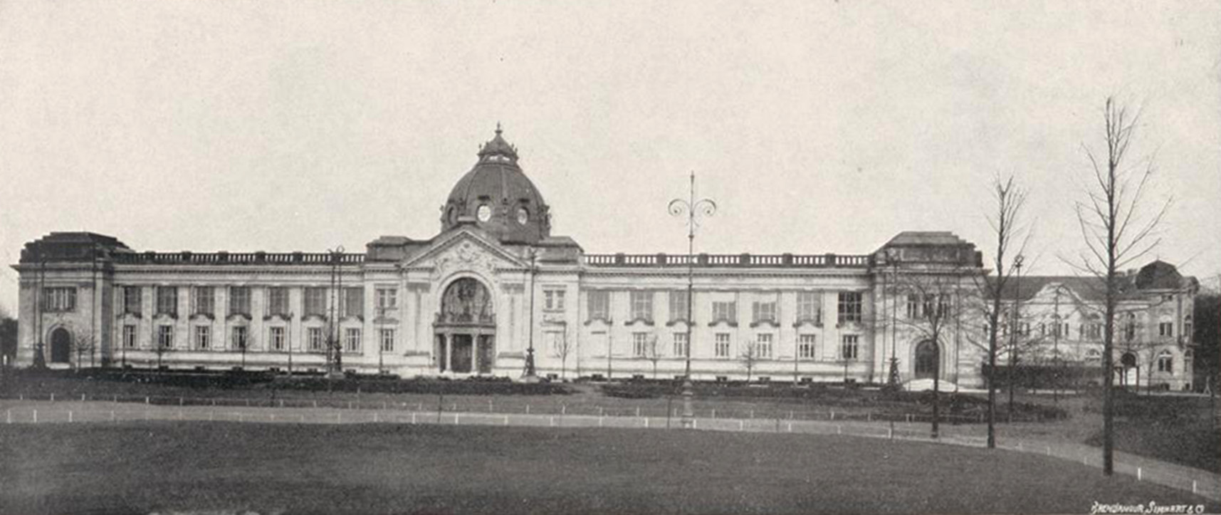 Kunstpalast und Restaurant erbaut 1900 bis 1902 von Philipp Holzmann in Frankfurt a. Main, Bild Brend'amour, Simhart & Co. Das ehemalige Restaurant ist heute unter der Anschrift Ehrenhof Nr. 3 zu finden.